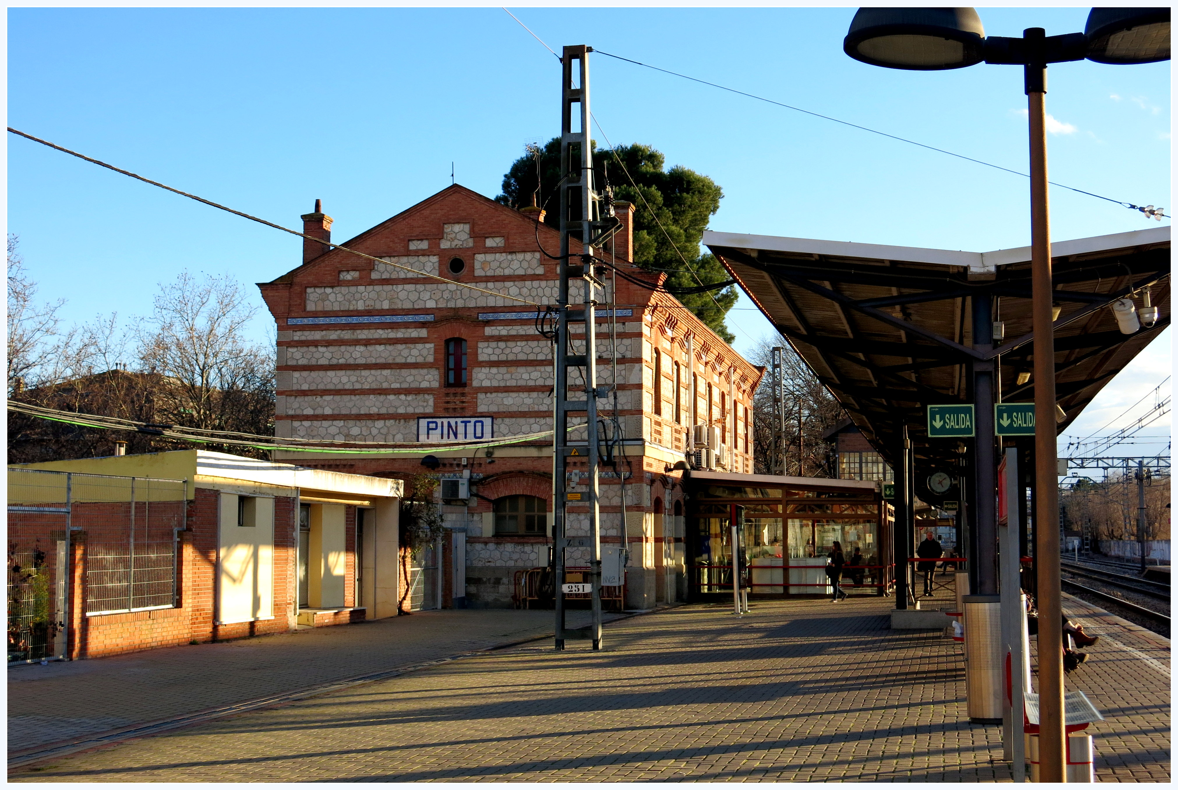 estación de Pinto